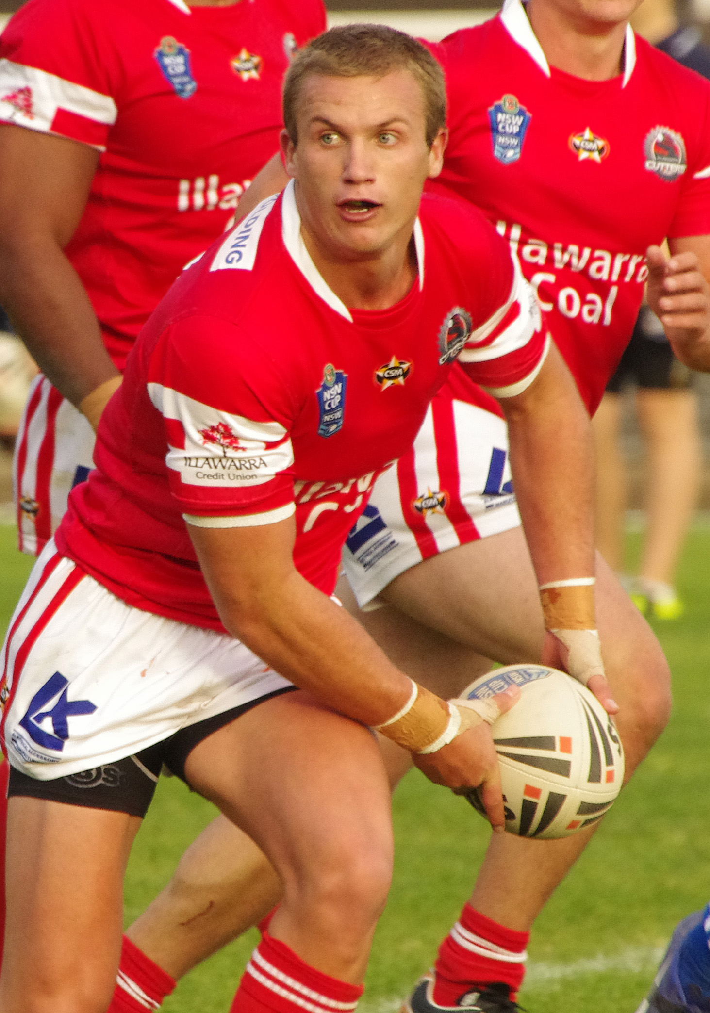 JOSH DRINKWATER